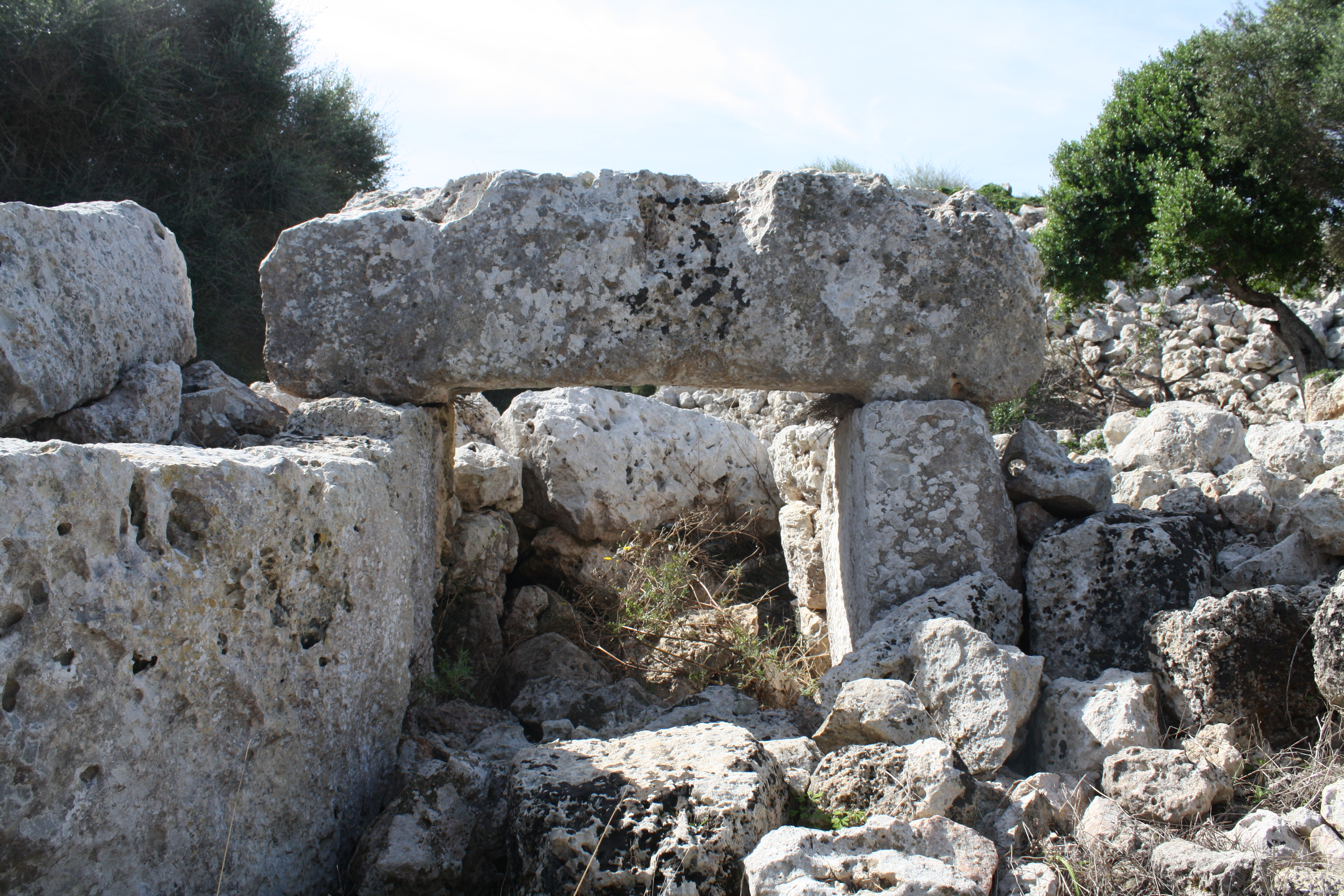 Talayotisches Dorf von Sant Agustí: Eingang eines posttalayotischen Hauses